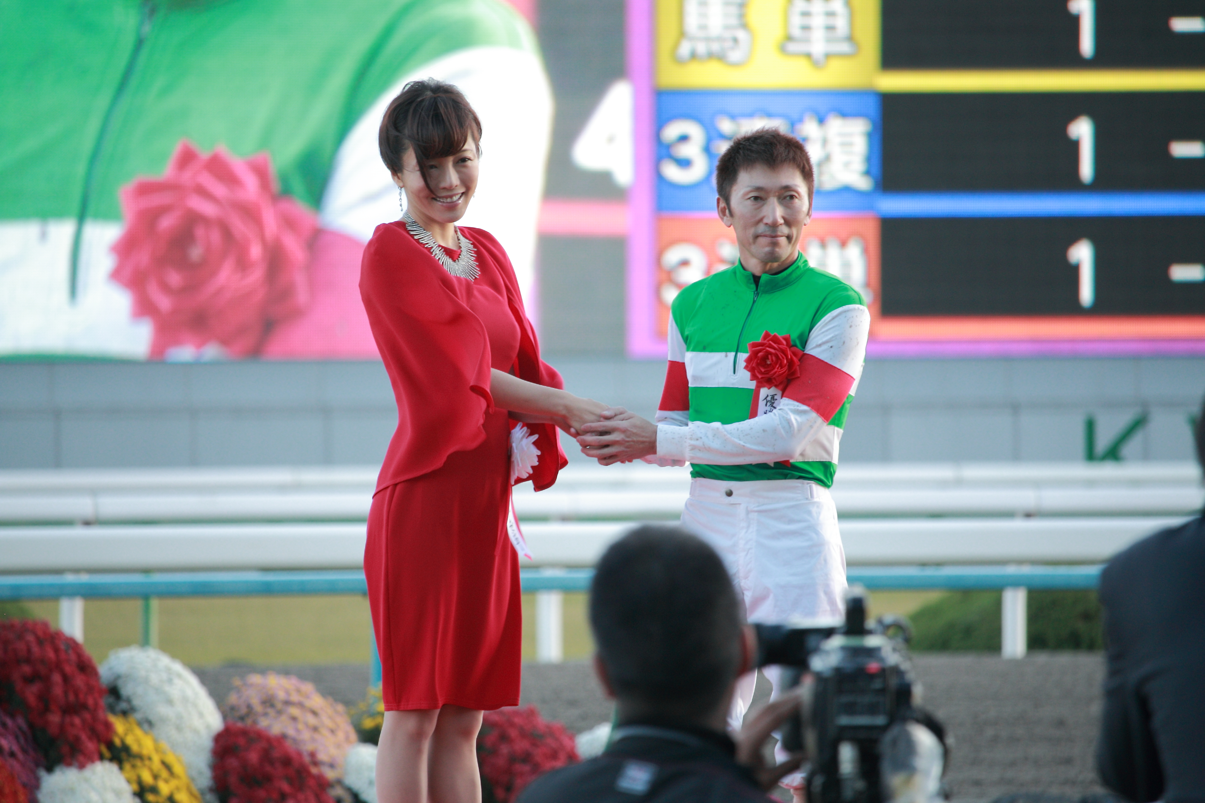 第40回エリザベス女王杯 プレゼンターの釈由美子